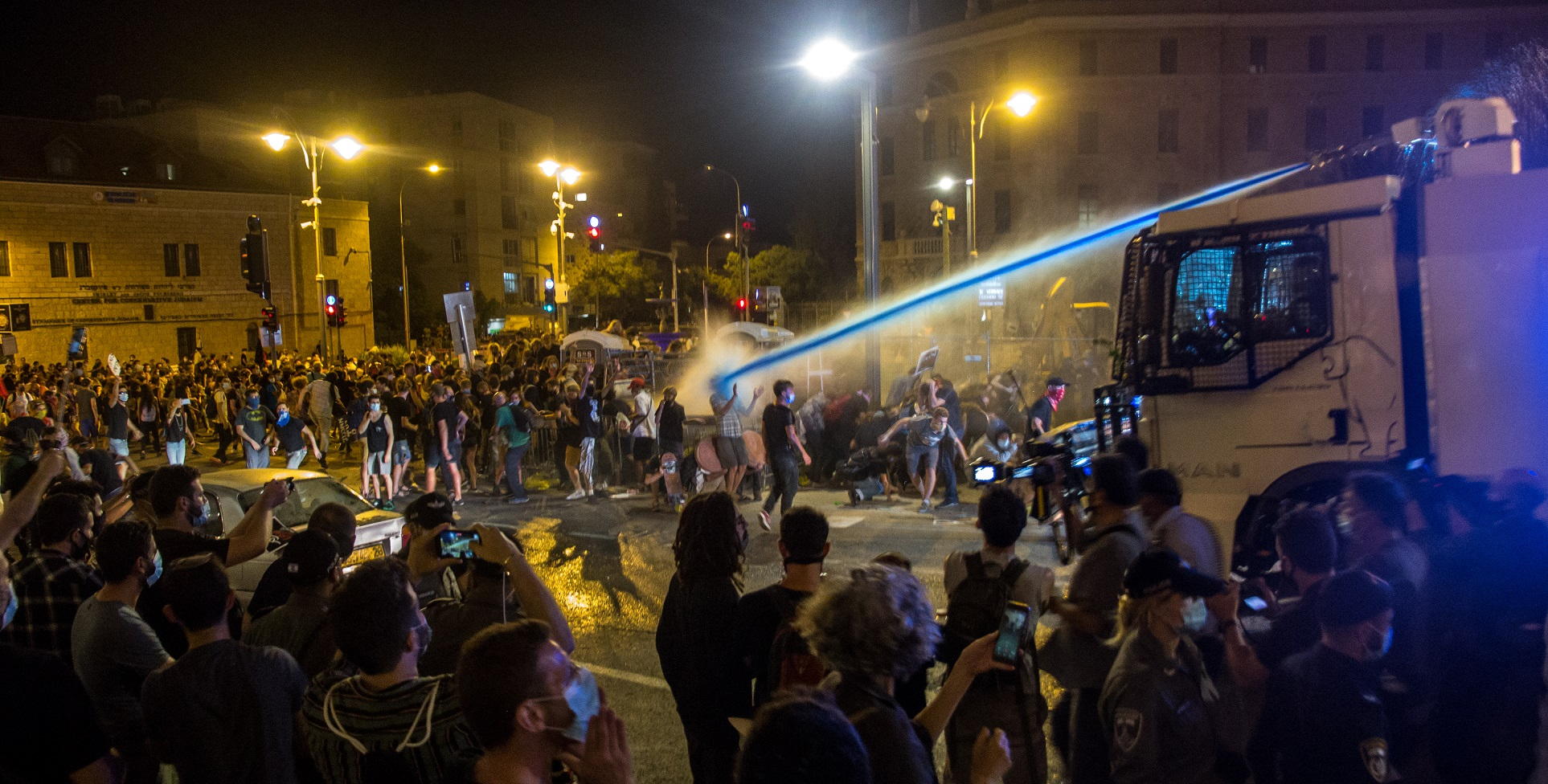 מכת"זית בהפגנה נגד נתניהו, ביולי 2020 בירושלים. השוטרים מכוונים את הסילון אל האנשים ממרחק קצר